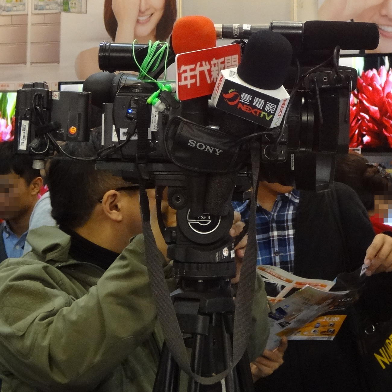 2013年台北資訊月，壹電視的Sony攝影機，插著壹電視與年代新聞的麥克風。